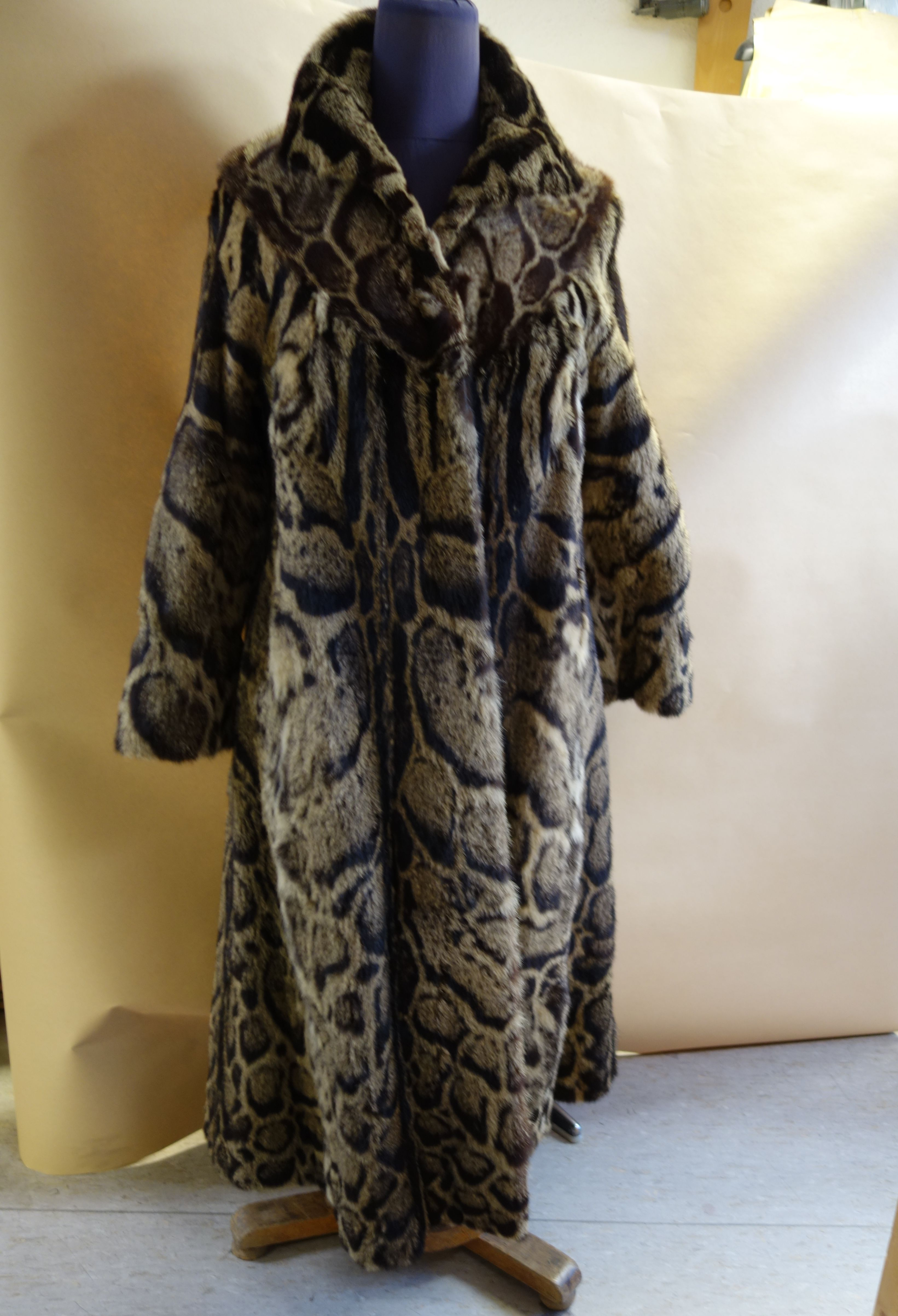 Alter Mantel aus Schildkrötenleopard-Fell (zoologisch Nebelparder).